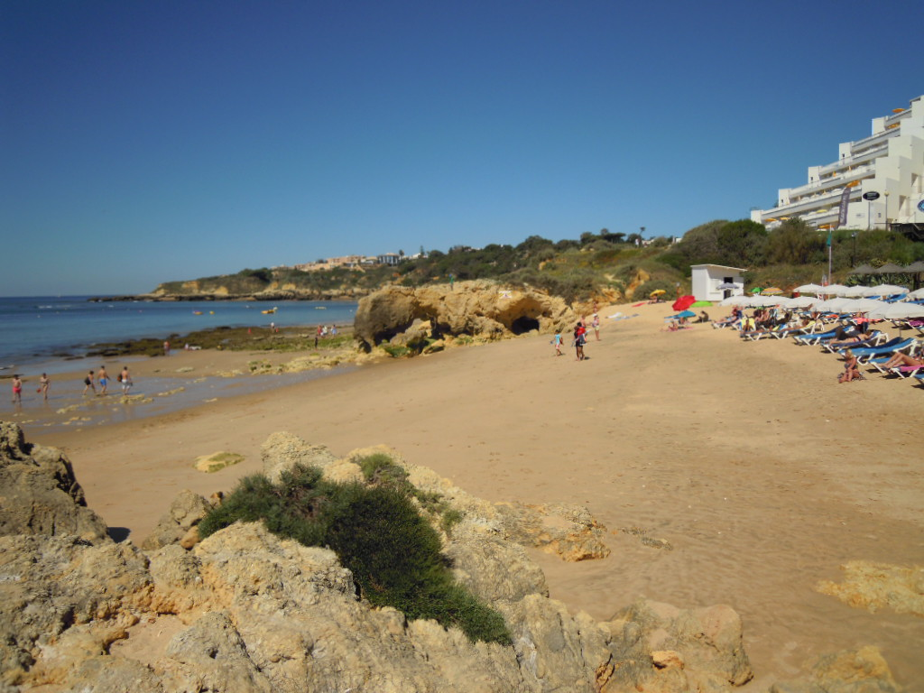 Praia da Oura, Albufeira, Portugal